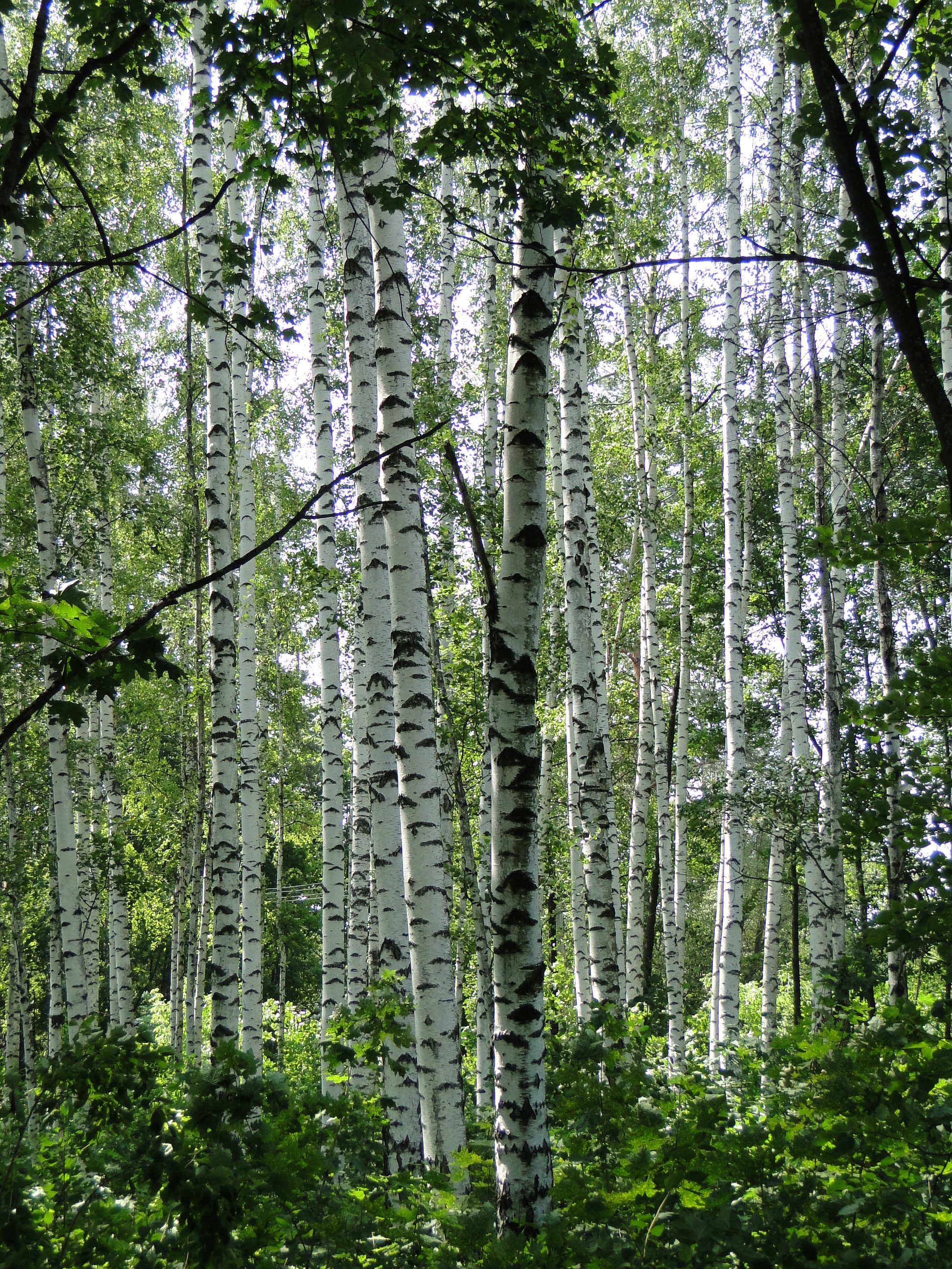 Воронежский биосферный заповедник. Березы